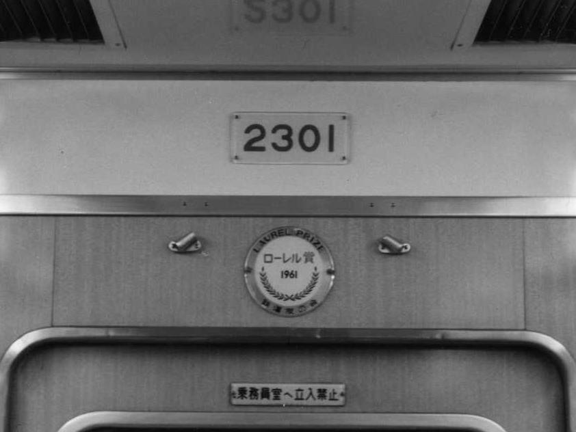 初代ローレル賞プレート（2301冷改前から台座なしの直付け）